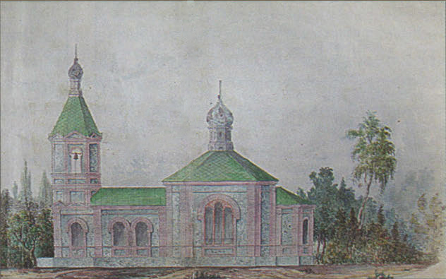 Беларуская (тарашкевіца): Міронім (Mironim). Царква-мураўёўка, праект